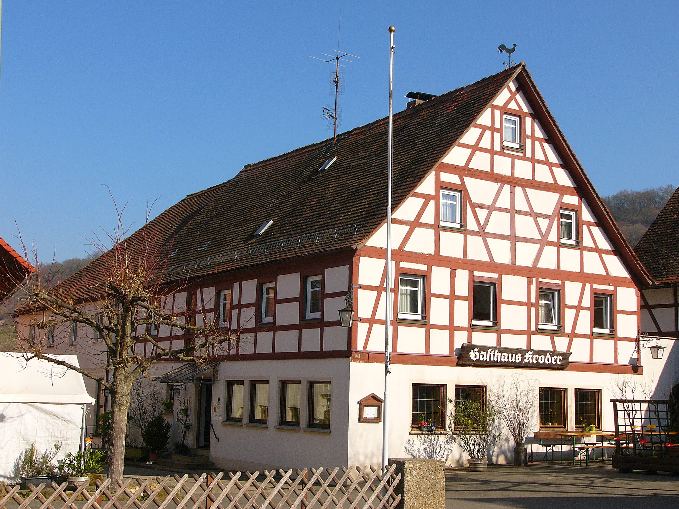 Gasthaus; zweigeschossiger giebelständiger Satteldachbau, massives Erdgeschoss, Fachwerkobergeschoss, bezeichnet 1844.This is a photograph of an architectural monument.